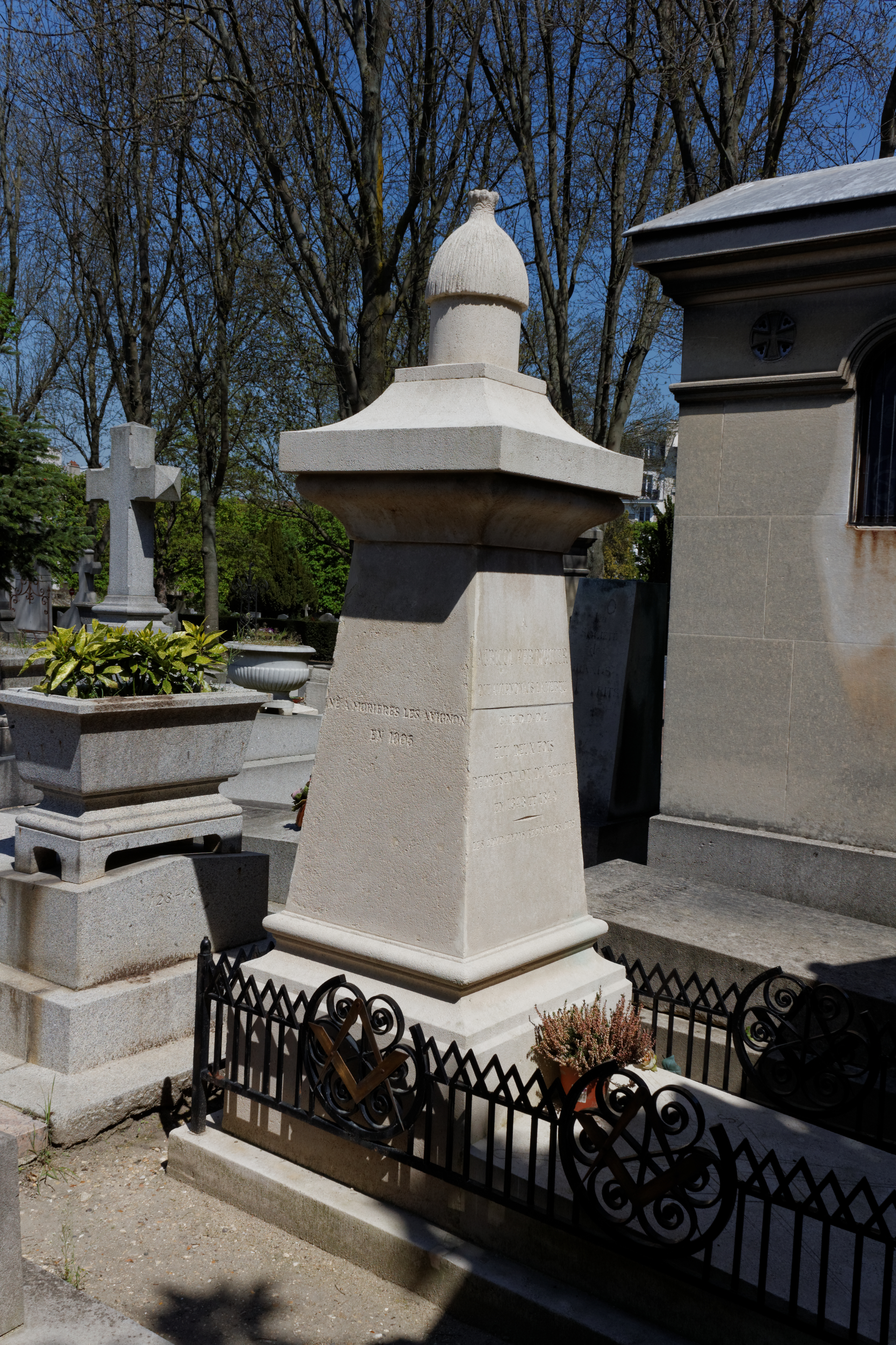 Stèle surmontée d'une ruche